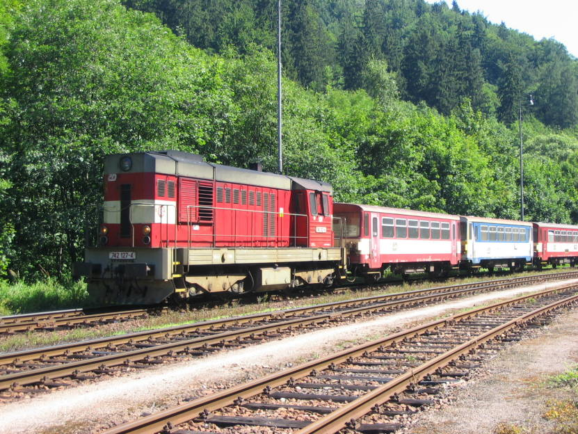 Lokomotiva řady 742, stanice Litice nad Orlicí